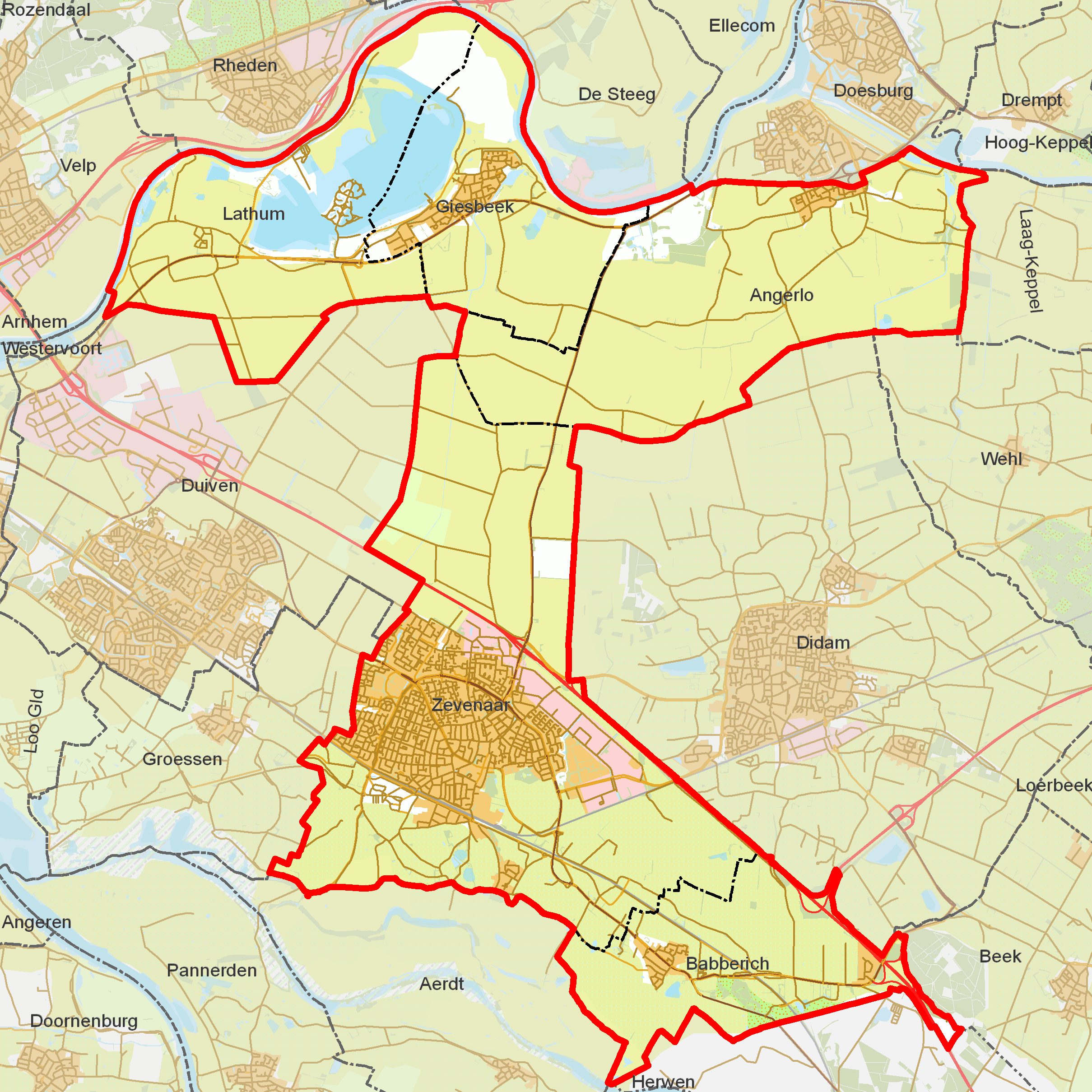 BAG woonplaatsen - Gemeente Zevenaar.png